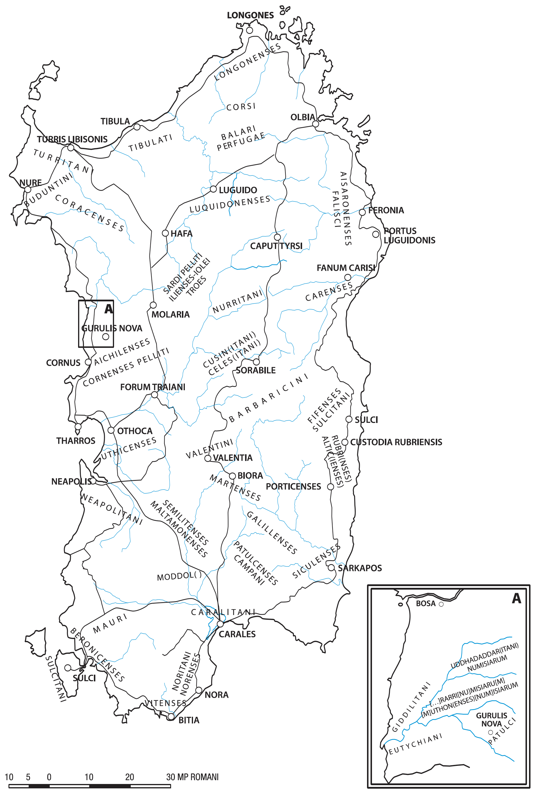 Indicazione dettagliata delle tribù rilevate dai romani in Sardegna